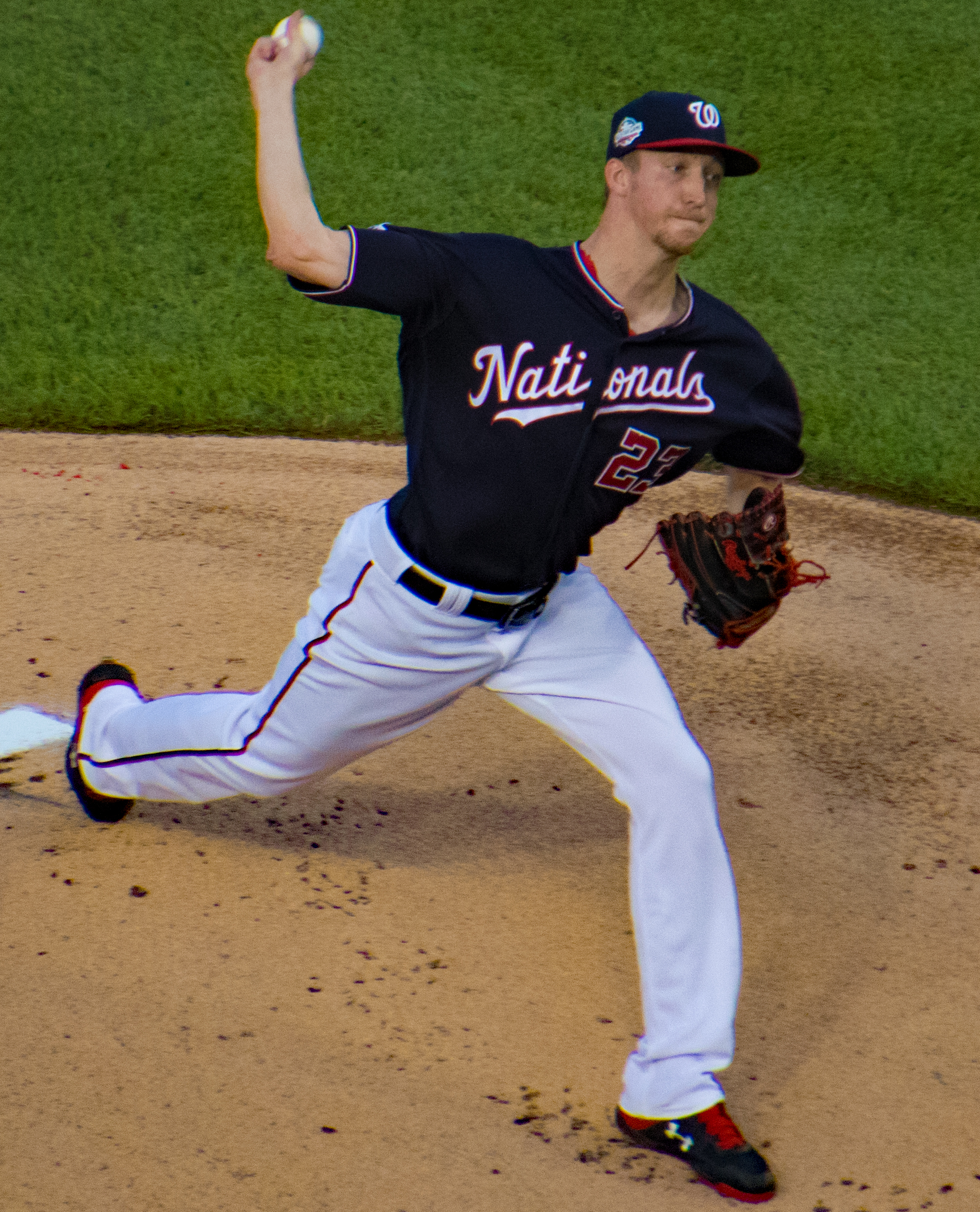 Erick Fedde